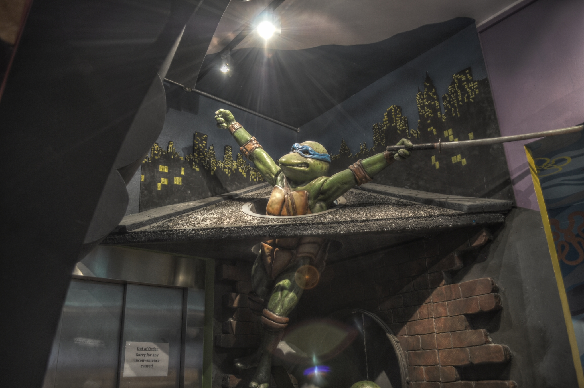 Camera: Nikon D5000 Luminance HDR, Mantiuk '06